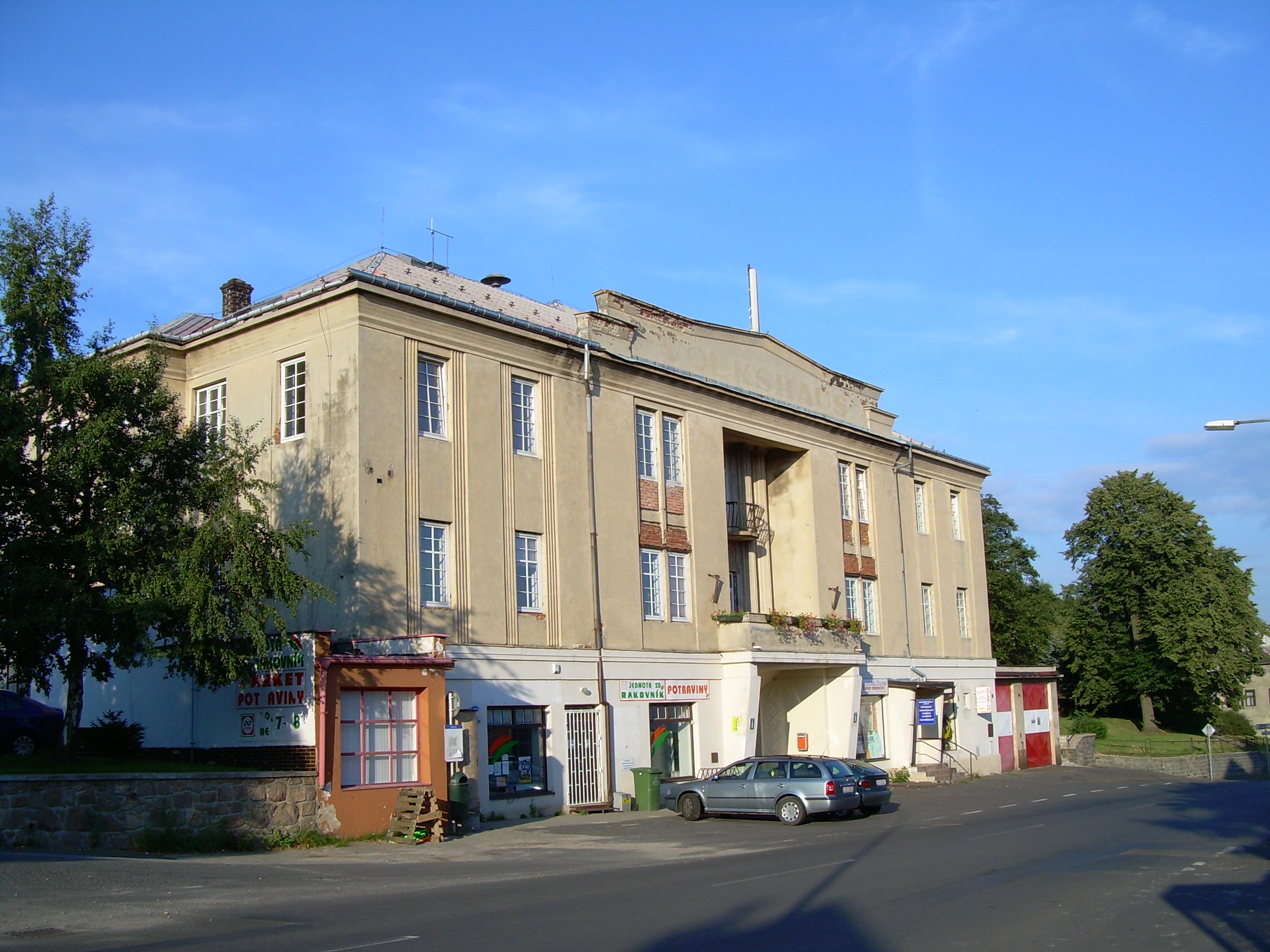 Obecní úřad v Tisé